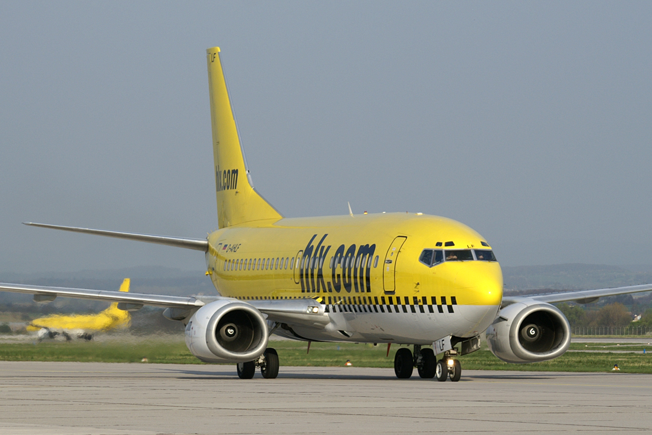 HLX Boeing 737-500 D-AHLF Stuttgart Airport